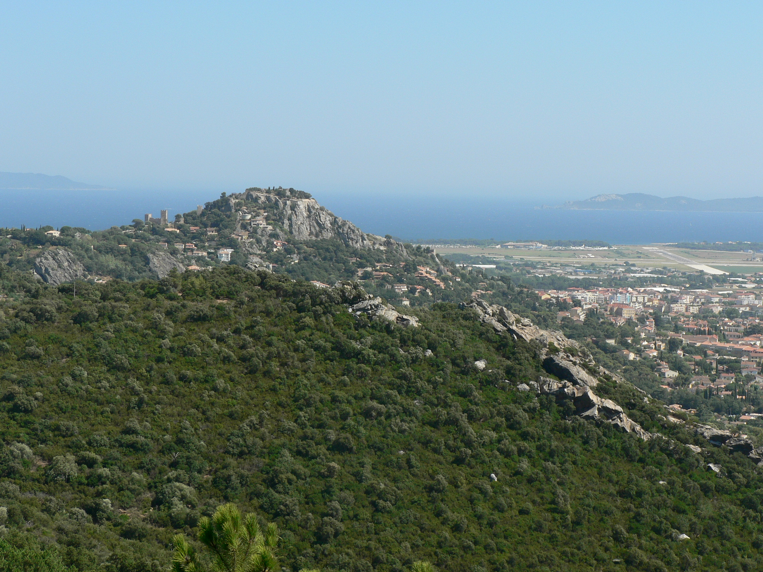 Vue de la face nord-est de la colline du château d'Hyères, dite colline du Castéou, prise depuis le mont Fenouillet. Au fond la rade d'Hyères et sur l'horizon à droite, l'île de Porquerolles. Sur la droite de la photo, en bas de la colline, la ville moderne d'Hyères apparue au XIXe siècle et près de la mer l'aéroport.